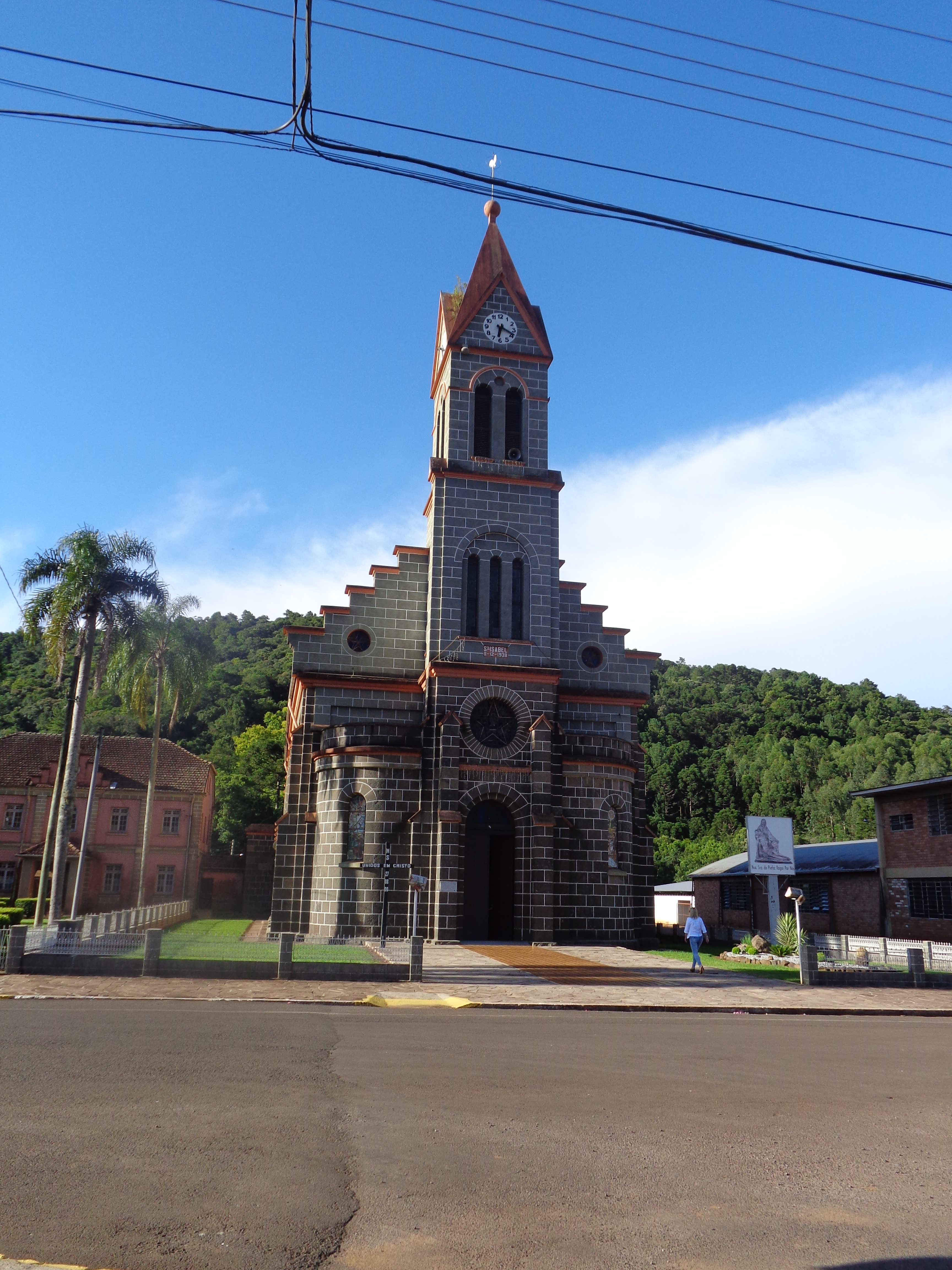 Igreja Matriz de Três Arroios, em 17 de fevereiro de 2015